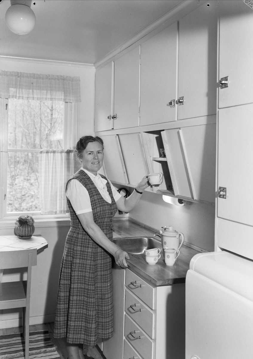 Alette Engelhart, leder av Norsk husmorforbund. 1950. Gjettum, Bærum. Eier: Oslo Museum